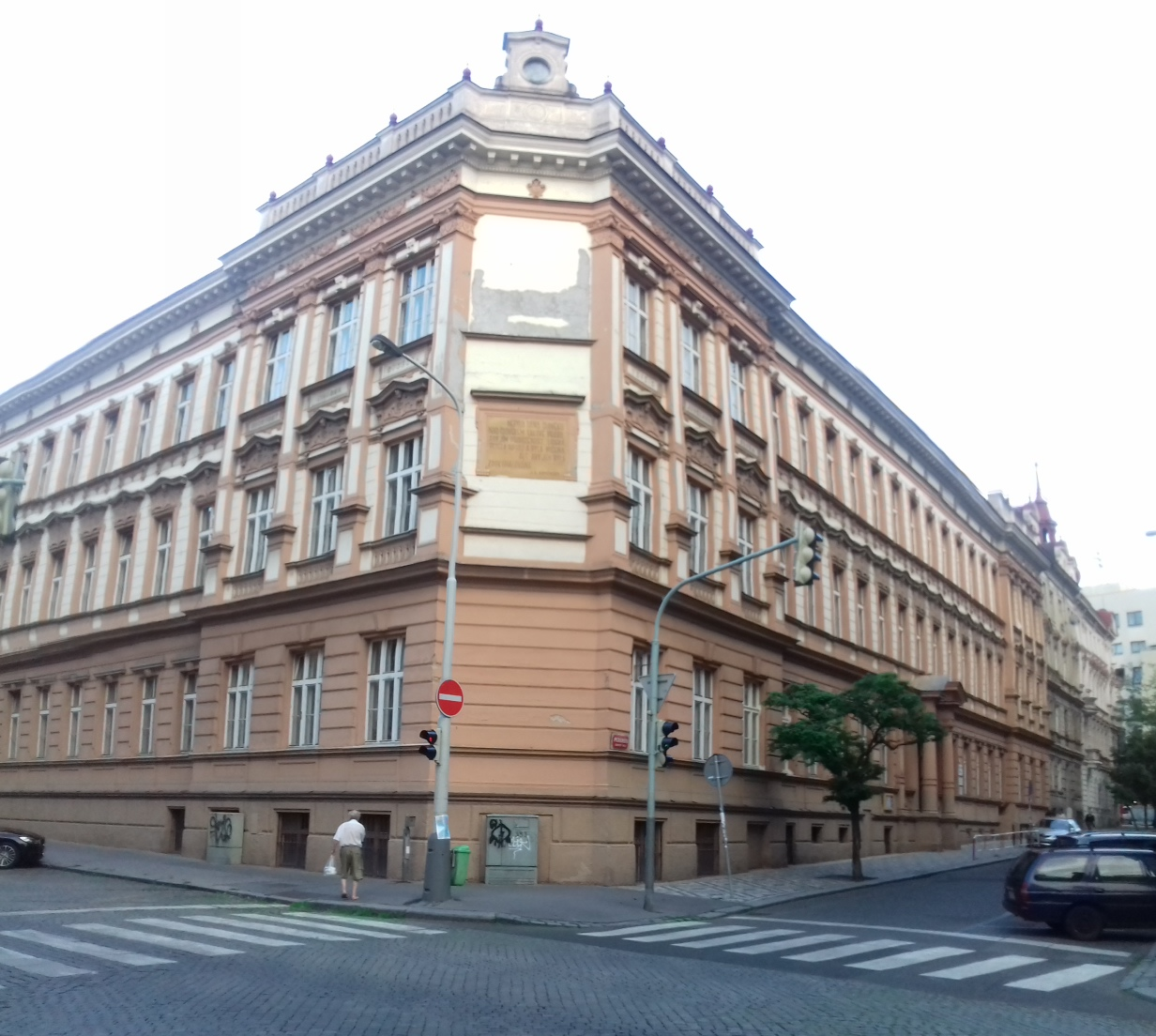 budova školy